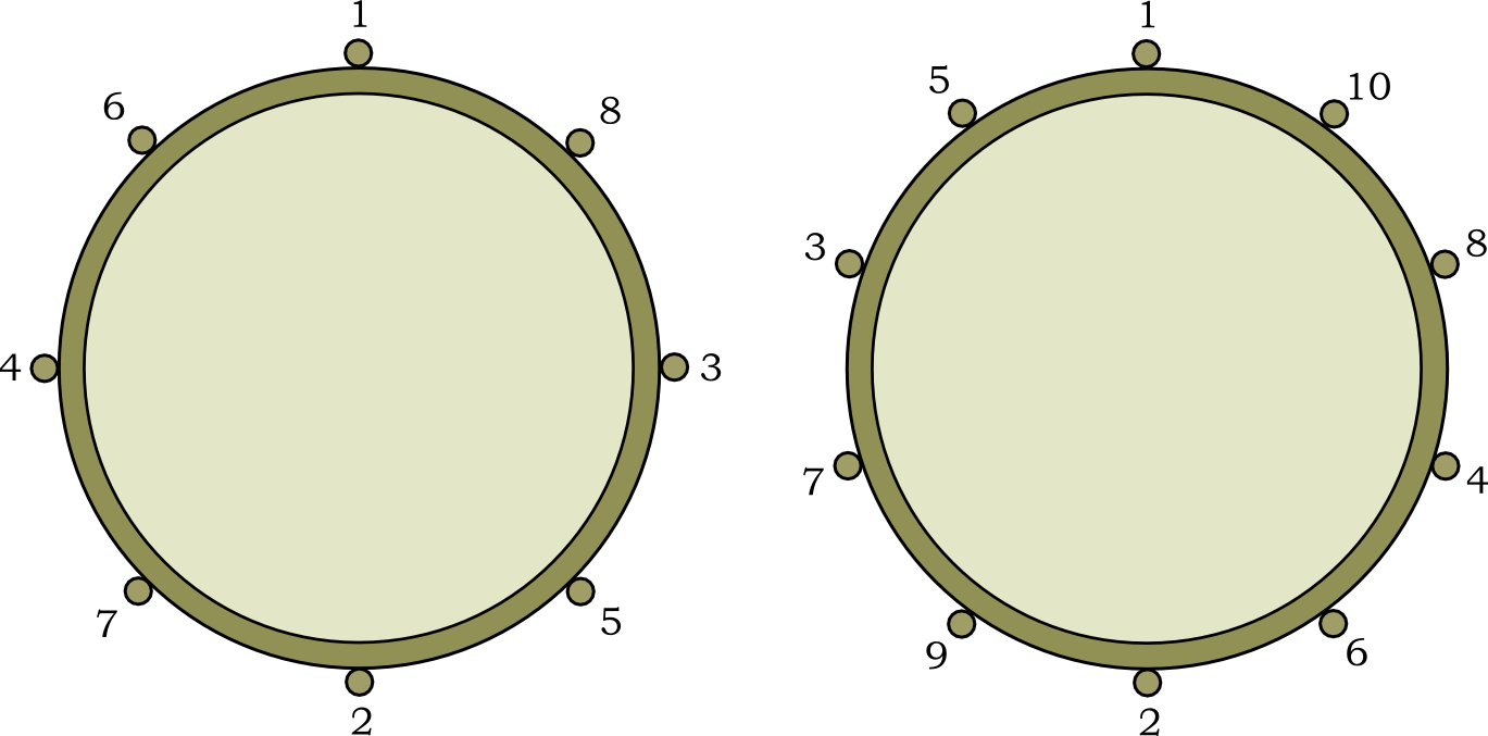 Comparación de la afinación en tambores de 10 y 8 tornillos